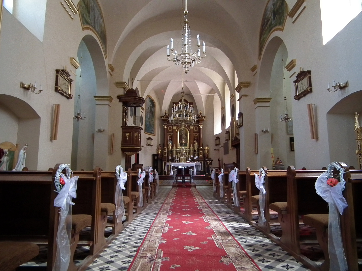 Wilkołaz - kościół parafialny p.w. św. Jana Chrzciciela (XVII, 1912-19)Cmentarz kościelny (zabytek nr rejestr. A/431 z 17.06.1957)